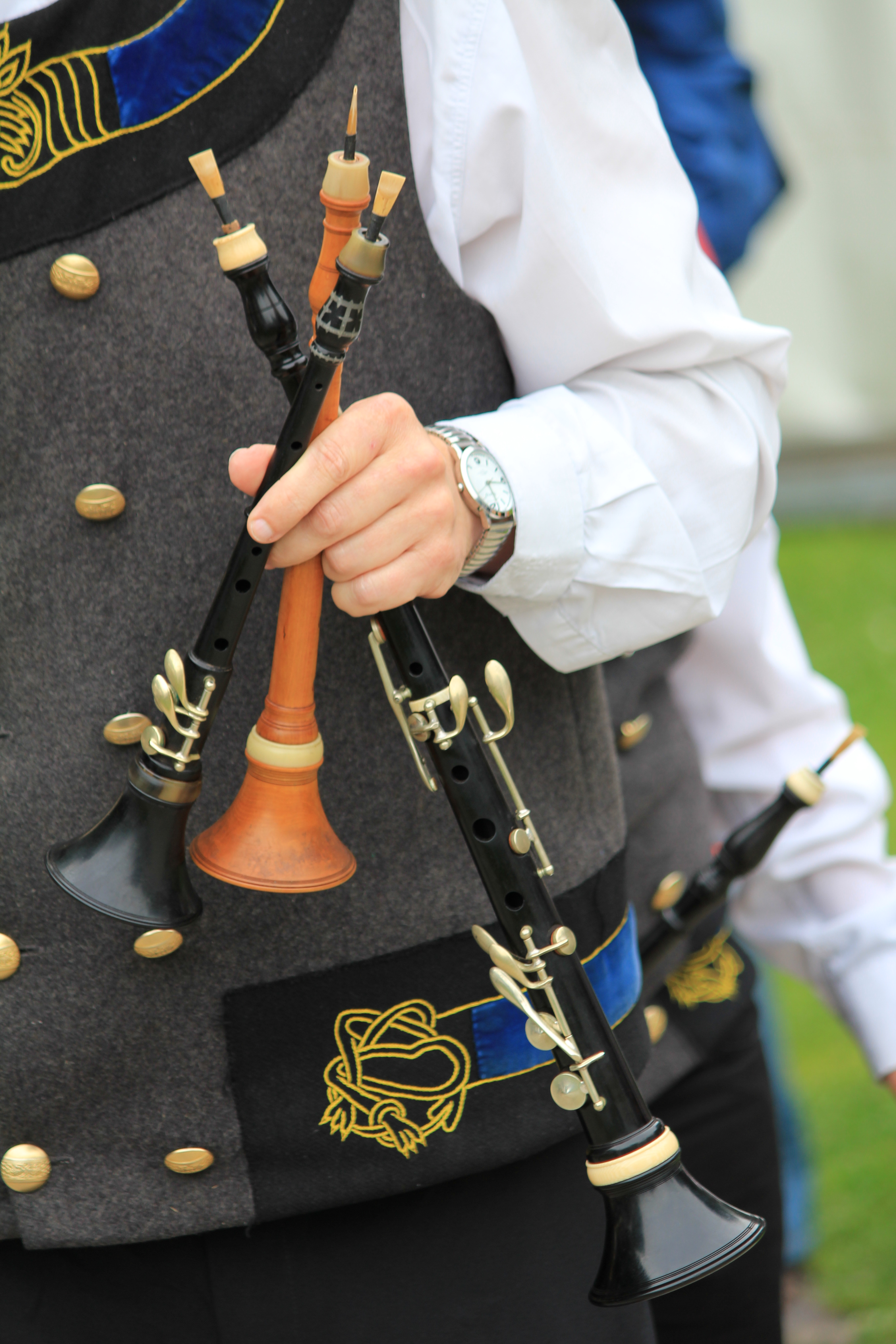 Le Bagad An Hanternoz de Dol-de-Bretagne lors de l'épreuve d'été du championnat national de bagadoù de 2eme division, organisé dans le cadre du Festival interceltique de Lorient, France.